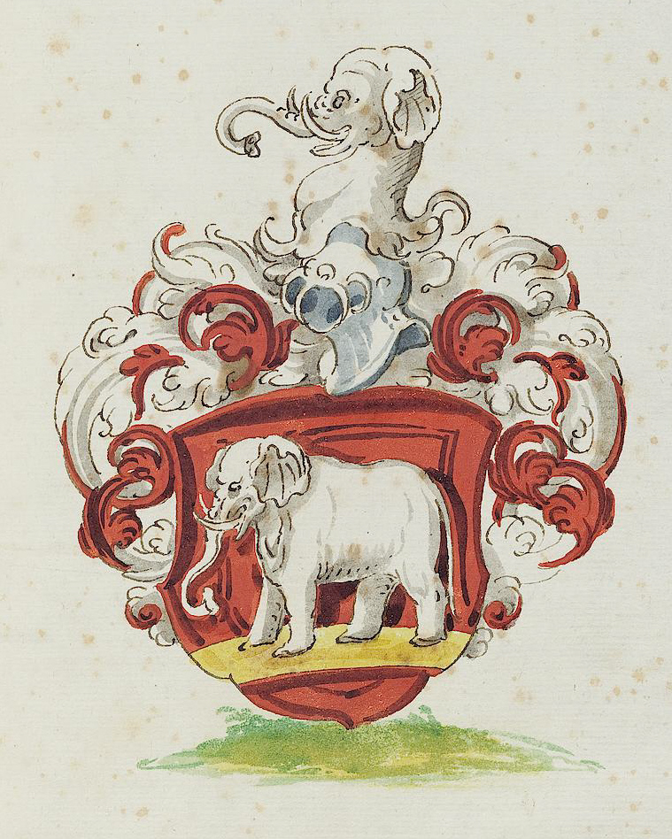 Wappen aus: David Wolleber: Chorographia Württemberg, [Schorndorf] 1591, Universitätsbibliothek Tübingen, Mh 6,1Wappen der Grafen von Helfenstein